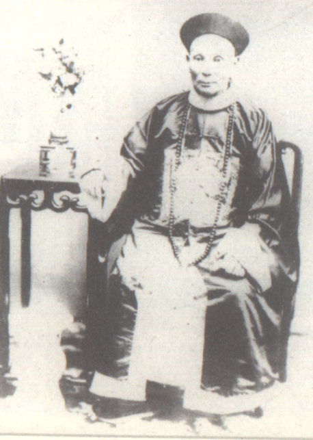 陈宜禧先生近照